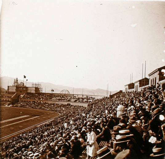 Grades de l’estadi de Montjuïc plenes de públic. Marcel·lí Gausachs i Gausachs (1929)